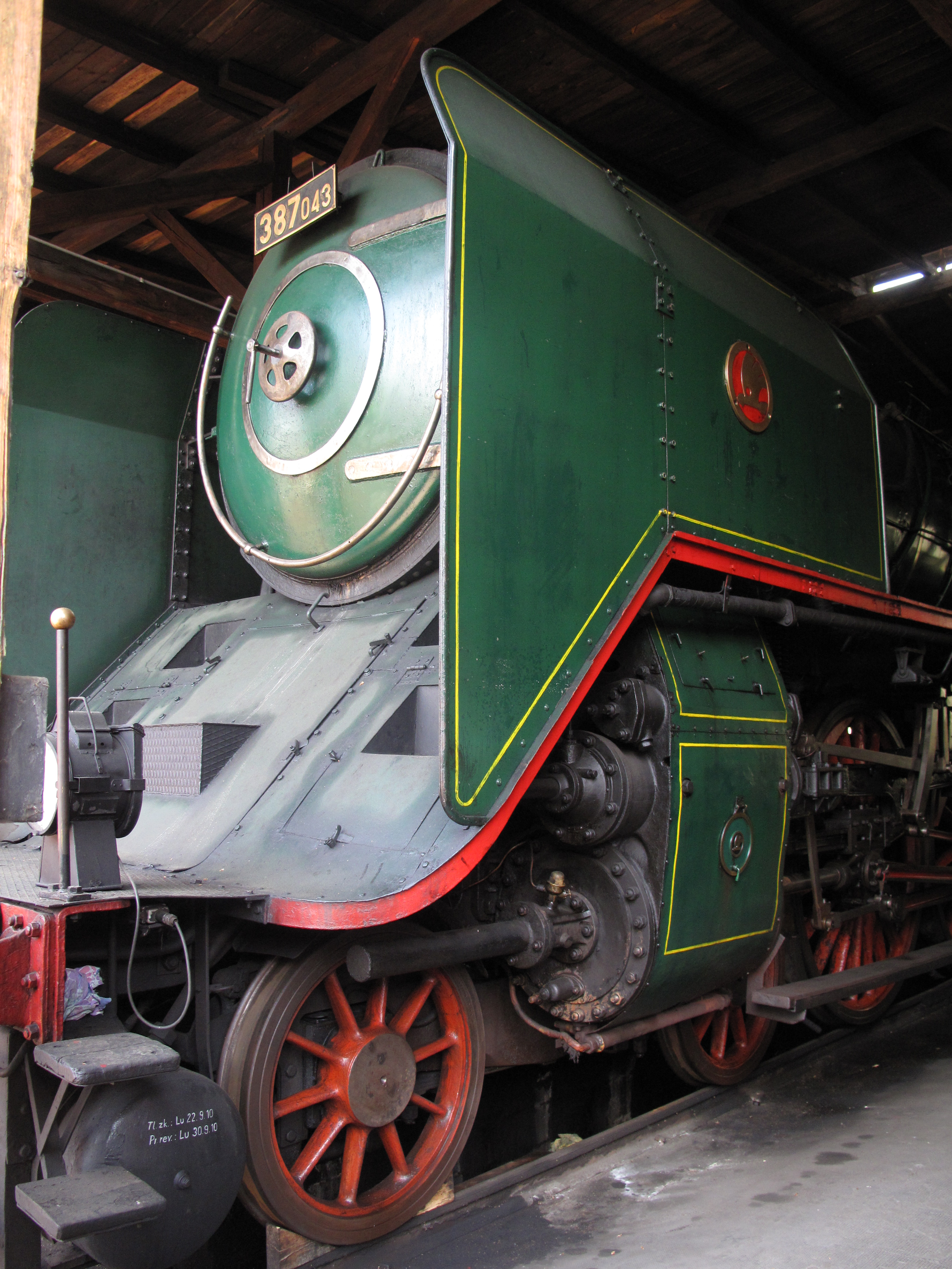 Parní lokomotiva v Lužné u Rakovníka